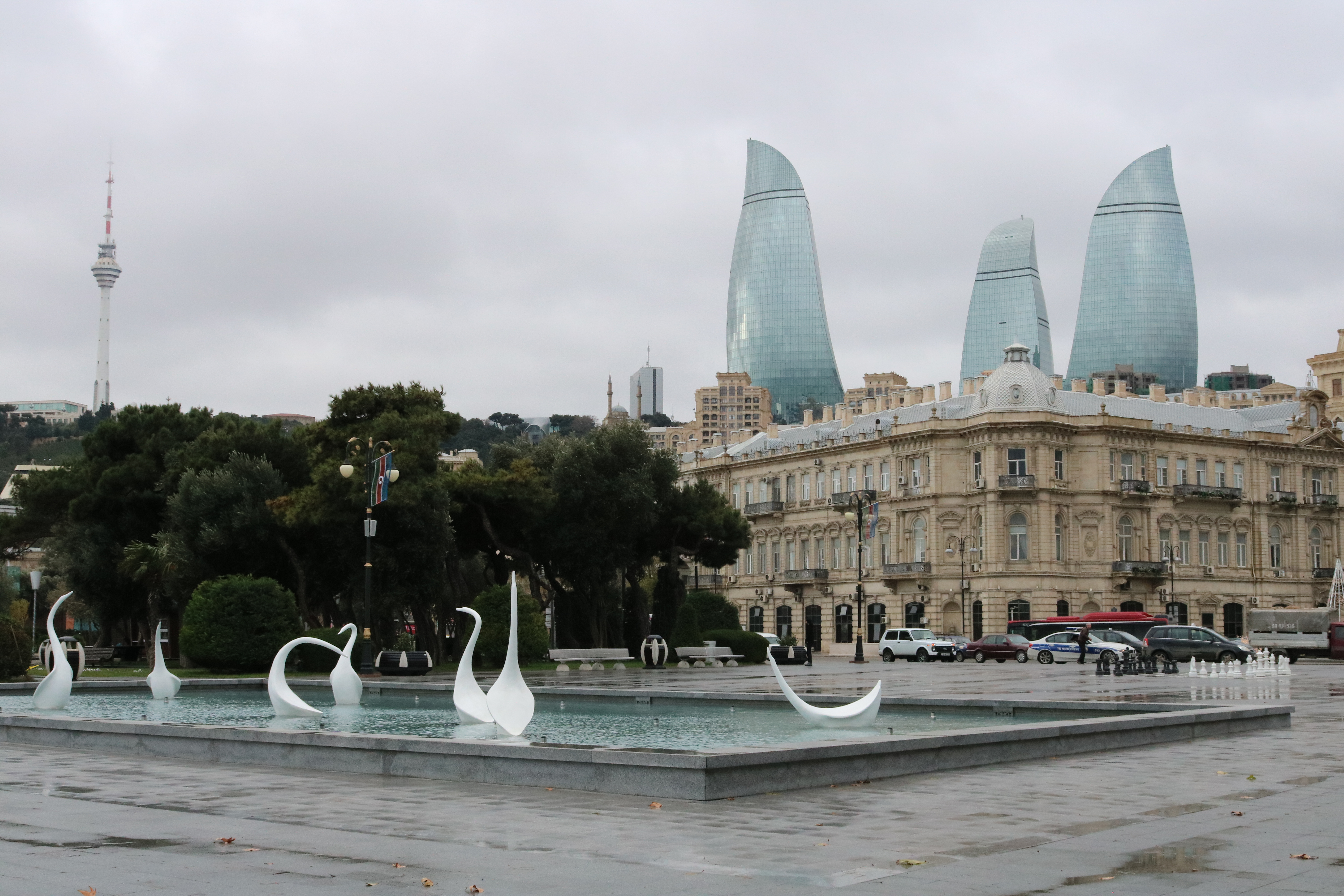 Dənizkənarı Milli Parkda “Qu quşları” fəvvarə kompleksi